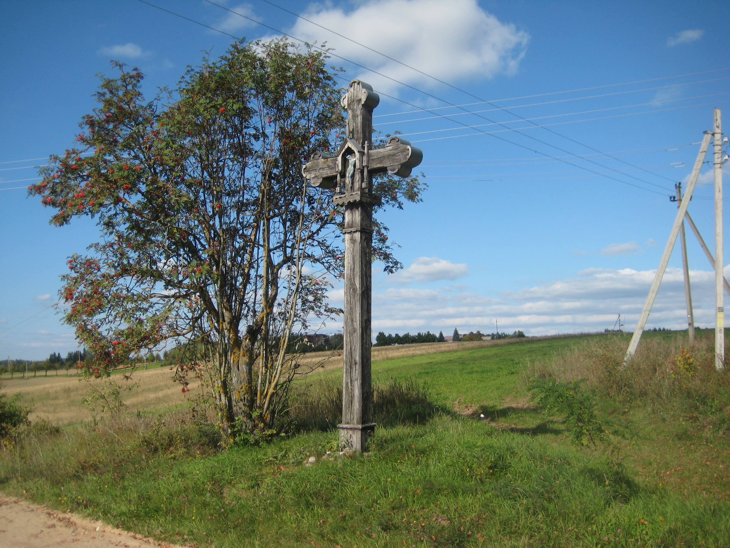 Sudeikių sen., Lithuania